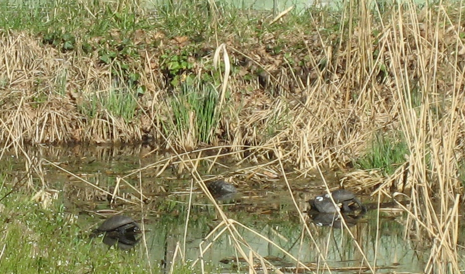 tortue cistude, espèce protégée